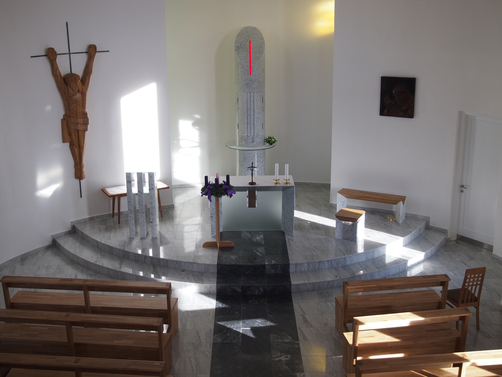 Fotografie interiéru a oltáře Kaple Jana Pavla II. byla pořízena krátce po jeho vysvěcení v roce 2013. Jde o první svatostánek v obci Bukovany, ležící nedaleko jihomoravského Kyjova. Hlavní relikvií umístěnou zakomponovanou v oltáři je kapka krve vpitá do oděvu Jana Pavla II.